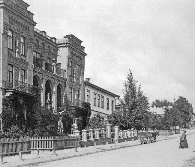 Киев. Дом по Кузнечной улице, 32 (ныне ул. Антоновича)